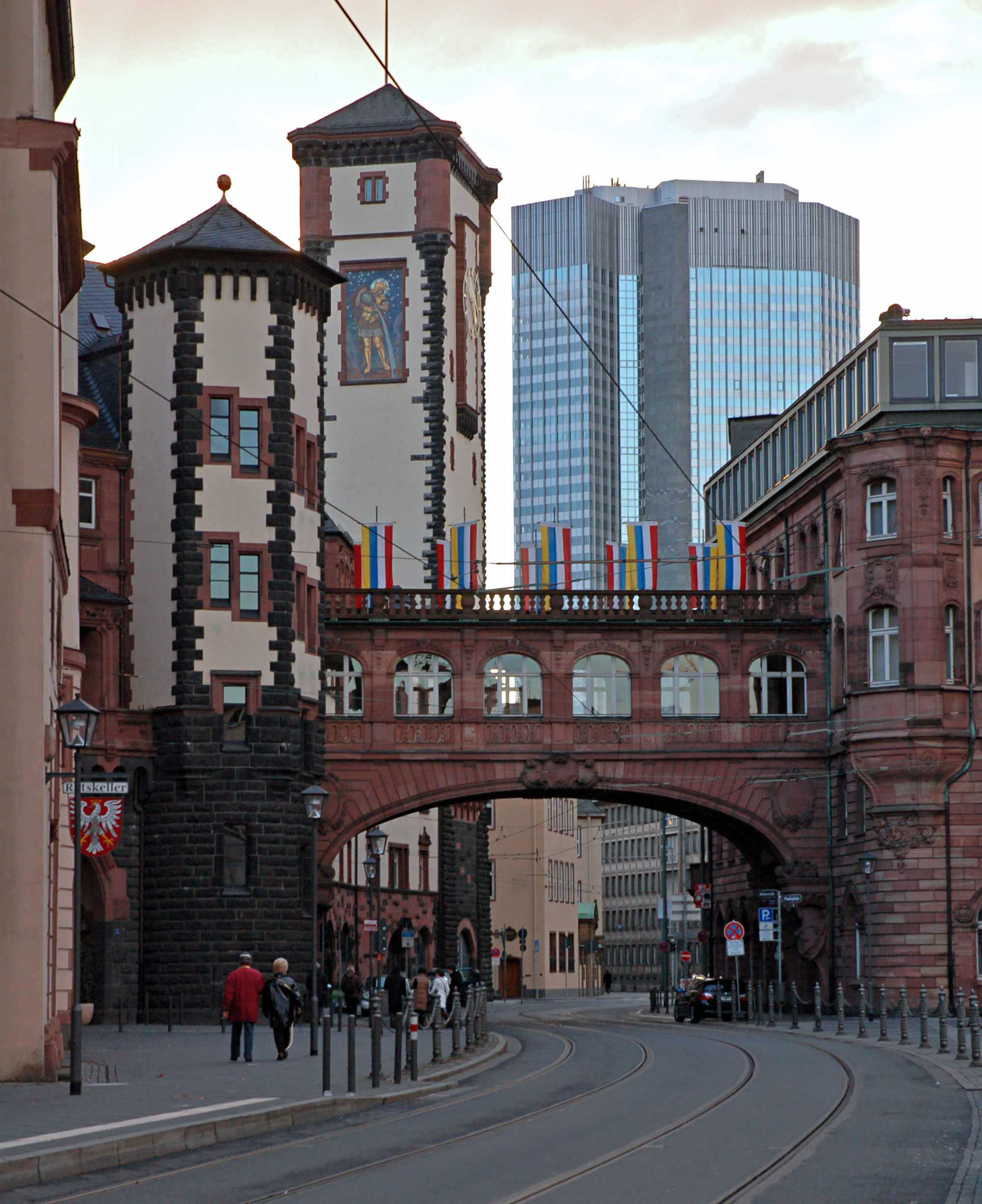 Frankfurt am Main, Langer Franz und Seufzerbrücke. Die Nord- und Südseite des Langen Franz hatten ursprünglich zwei große, heute in dieser originalen, Uhren mit Stundenglocken, die nach Goethes Mutter Frau Rat und Goethes Schwester Cornelia benannt waren.